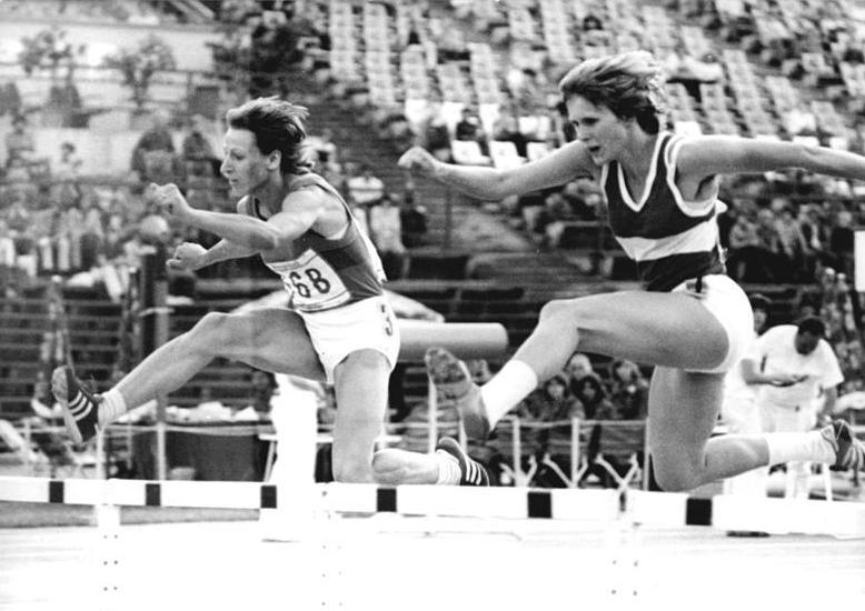 Karin Roßley, Anita Weiß ADN-ZB Kluge 1.7.78-Leipzig: DDR Leichtathletik-Meisterschaften- Einen packenden Zweikampf über 400 m Hürden lieferten sich Weltrekordlerin Karin Roßley aus Cottbus (r.) und die Neubrandenburger Mittelstrecklerin Anita Weiß. Erst nach der letzten Hürde konnte sich Anita Weiß einen knappen Vorsprung sichern und siegte in 56,39 s.